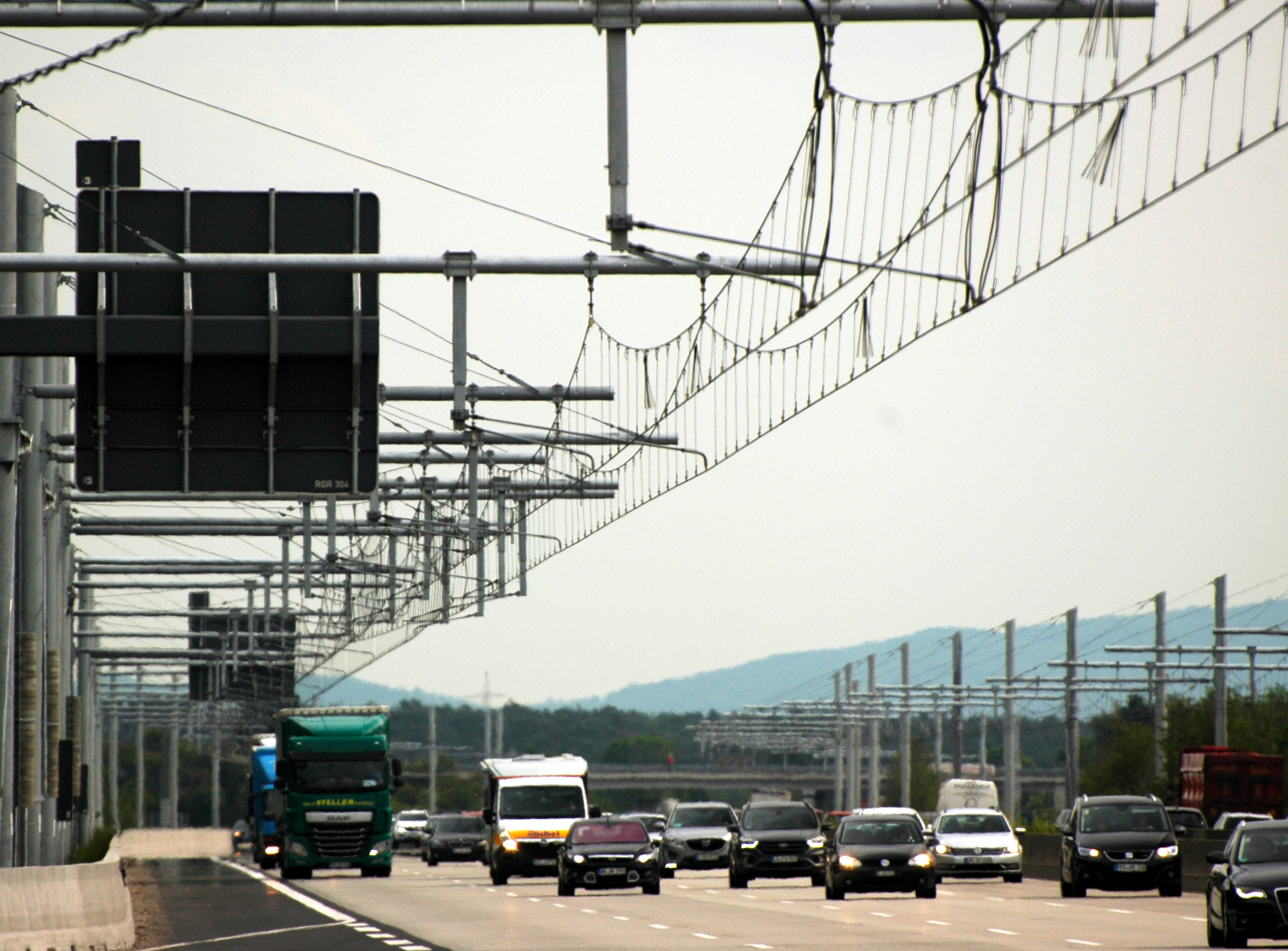 Elektroautobahn zwischen Frankfurt und Weiterstadt